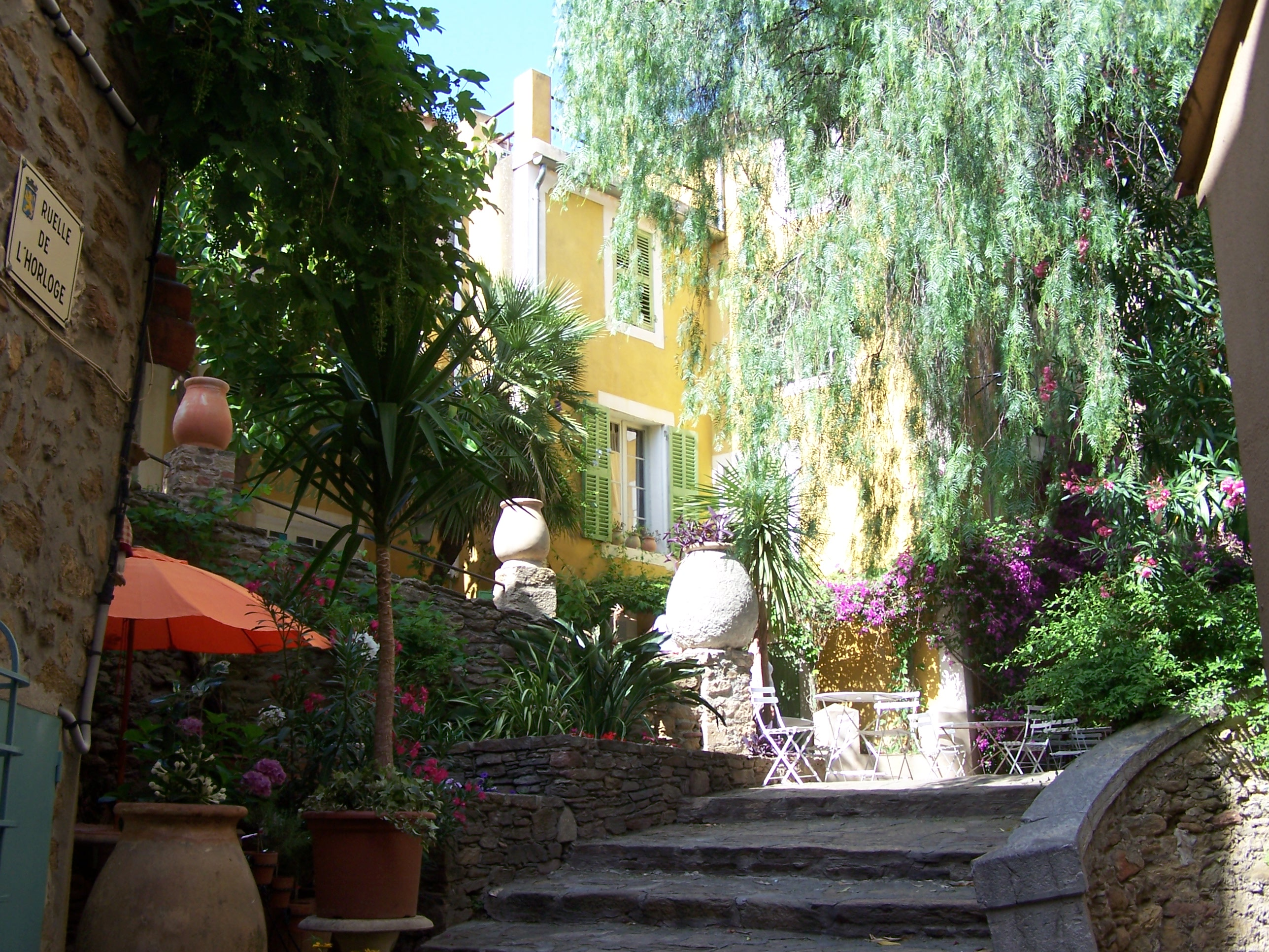 Rue de Bormes